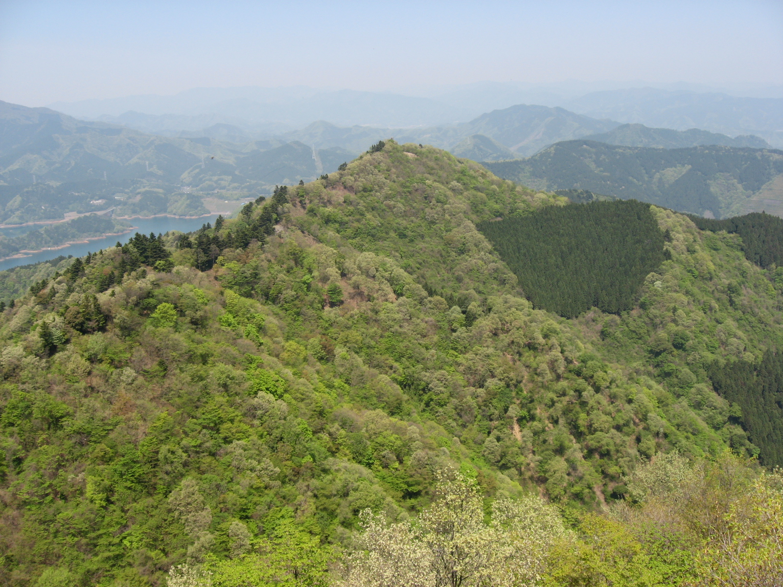 仏果山展望台より高取山